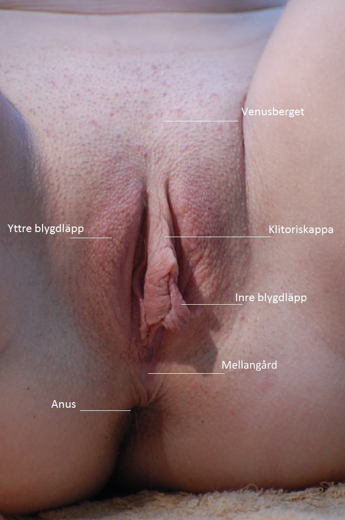 Hårlös vulva med anatomiska detaljer utmärkta